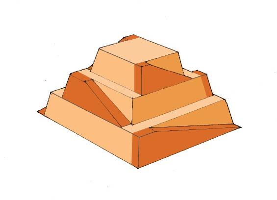 Rampes pour l'édification d'une pyramide à degrés